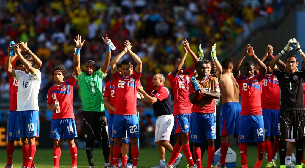 Selección Nacional de Costa Rica festejando el liderato del Grupo D.